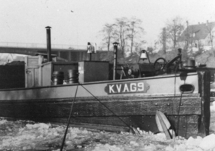 Bugansicht Göring-Kahn